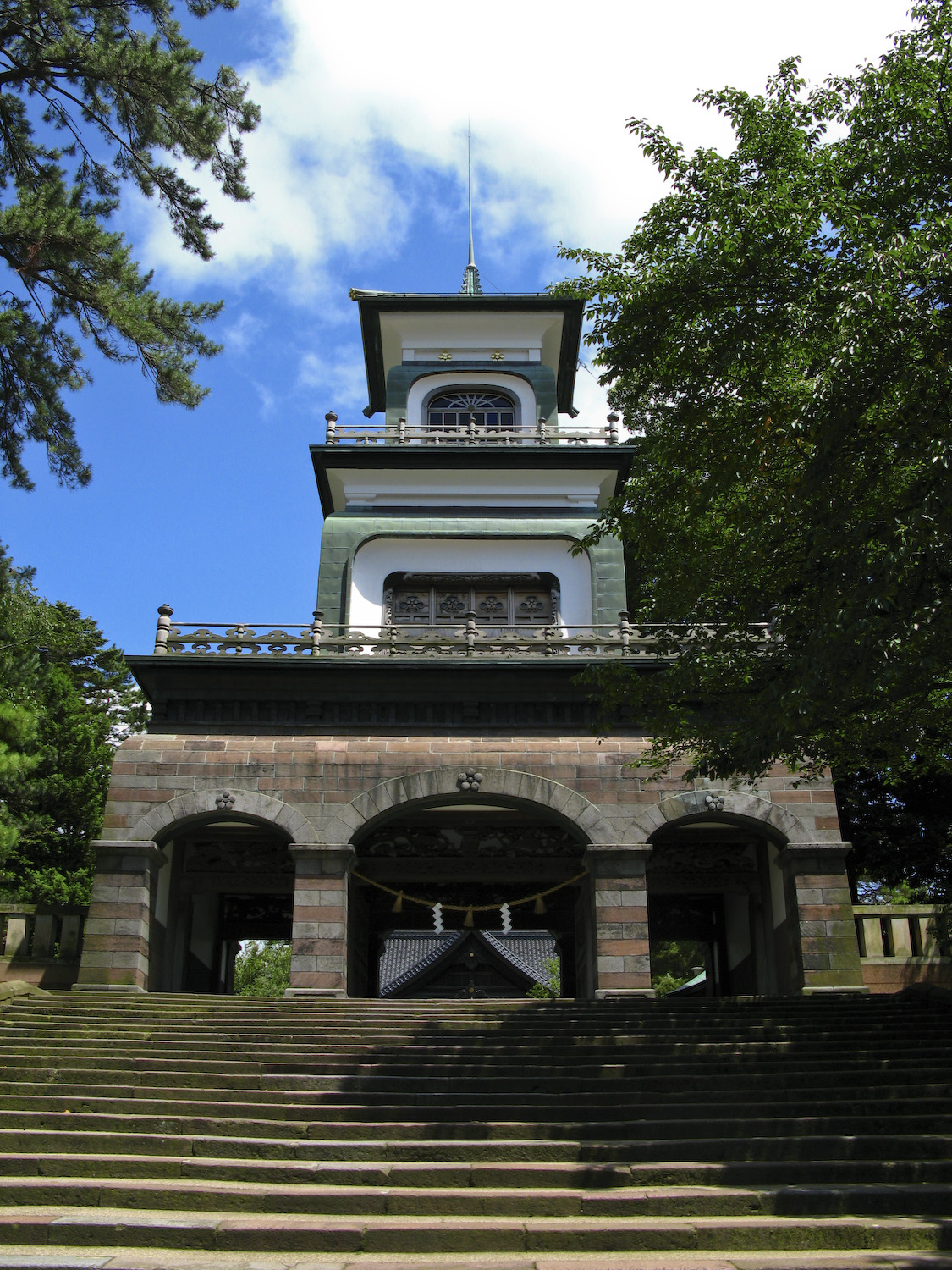 Oyama Shrine, Kanazawa, Ishikawa Prefecture, Japan